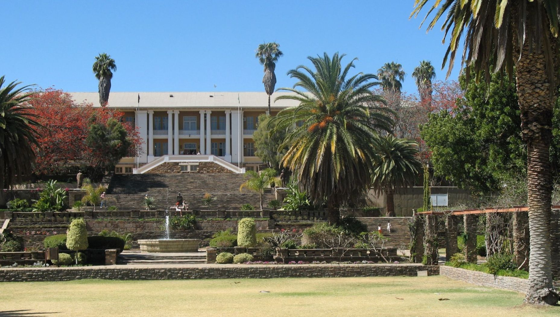 Regierungssitz, Tintenpalast